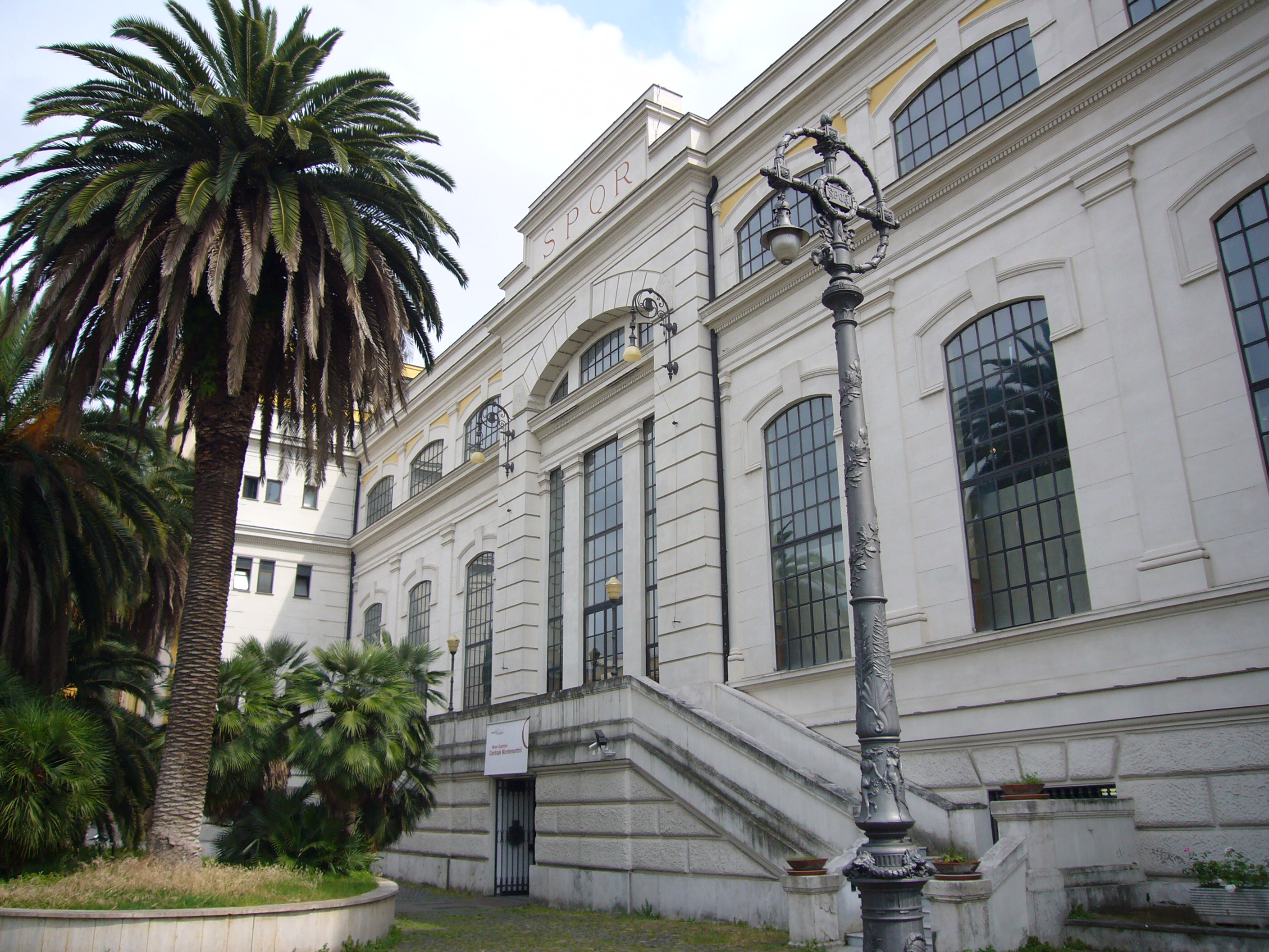 Centrale Montemartini a Roma, prospetto. Centrale Montemartini Native nameCentrale MontemartiniLocationRome, ItalyCoordinates41° 52′ 00.48″ N, 12° 28′ 41.12″ E Established2005Web page control : Q1054090 VIAF: 268486794 GND: 10105941-3 institution QS:P195,Q1054090